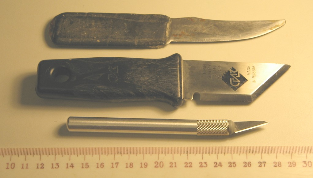 Tranĉiloj por prilabori diversajn materialojn, en konstruado, ankaŭ en muntado kaj riparado de elektrotekniko aparatoj. Mi, aŭtoro de la bildo, permesas al ĉiuj uzi ĝin kun ĉi tiaj kondiĉoj